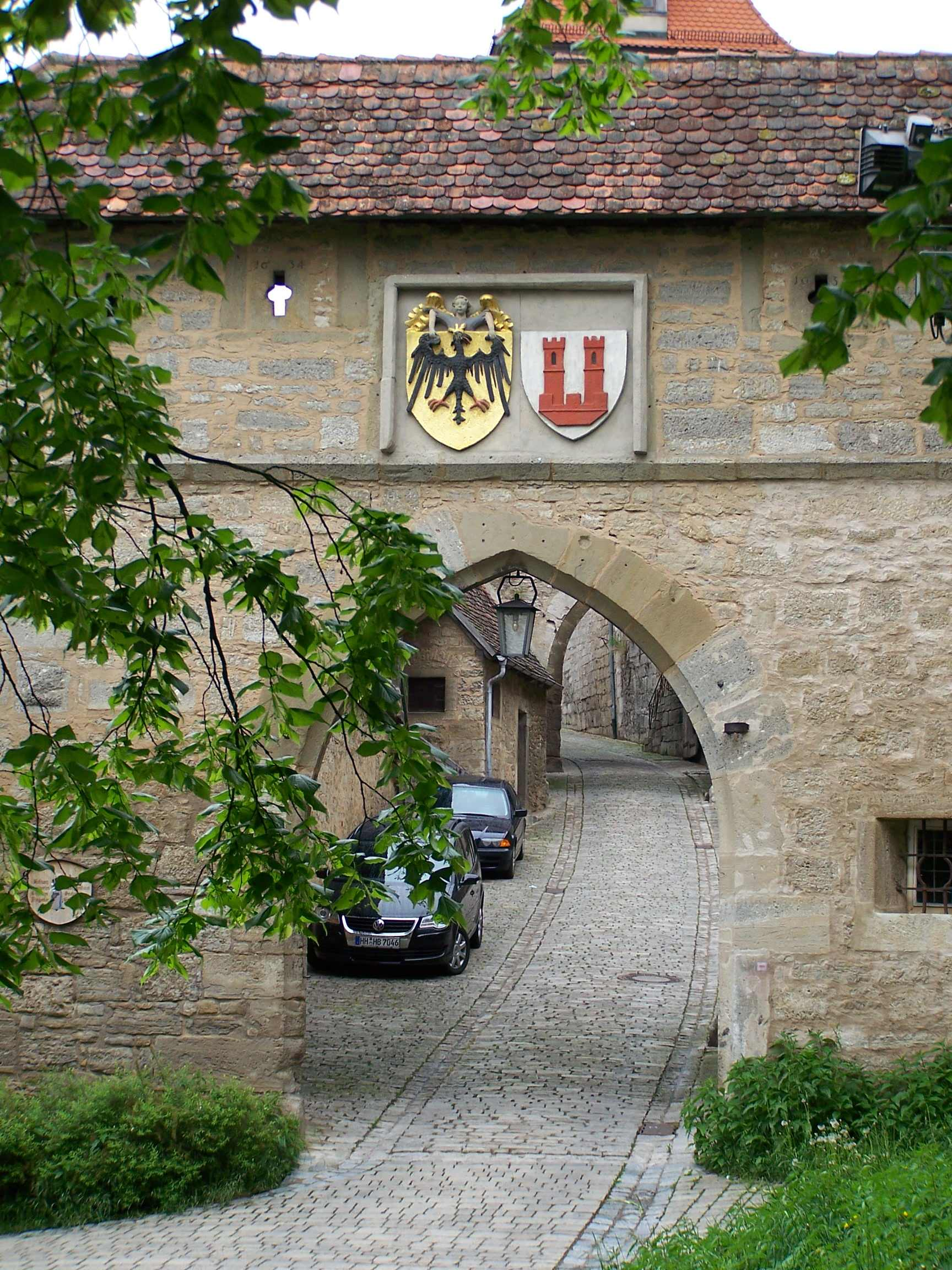 Rothenburg ob der Tauber: Äußeres Kobolzeller Tor